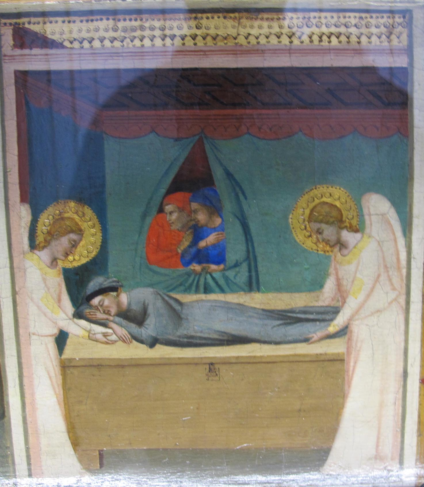 Bernardo daddi, predella con storie della cintola, 1337-1338, da duomo di prato